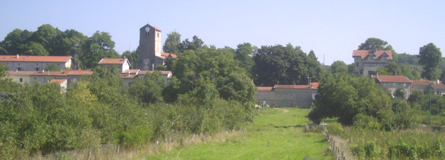 Commune de Tonnoy, église